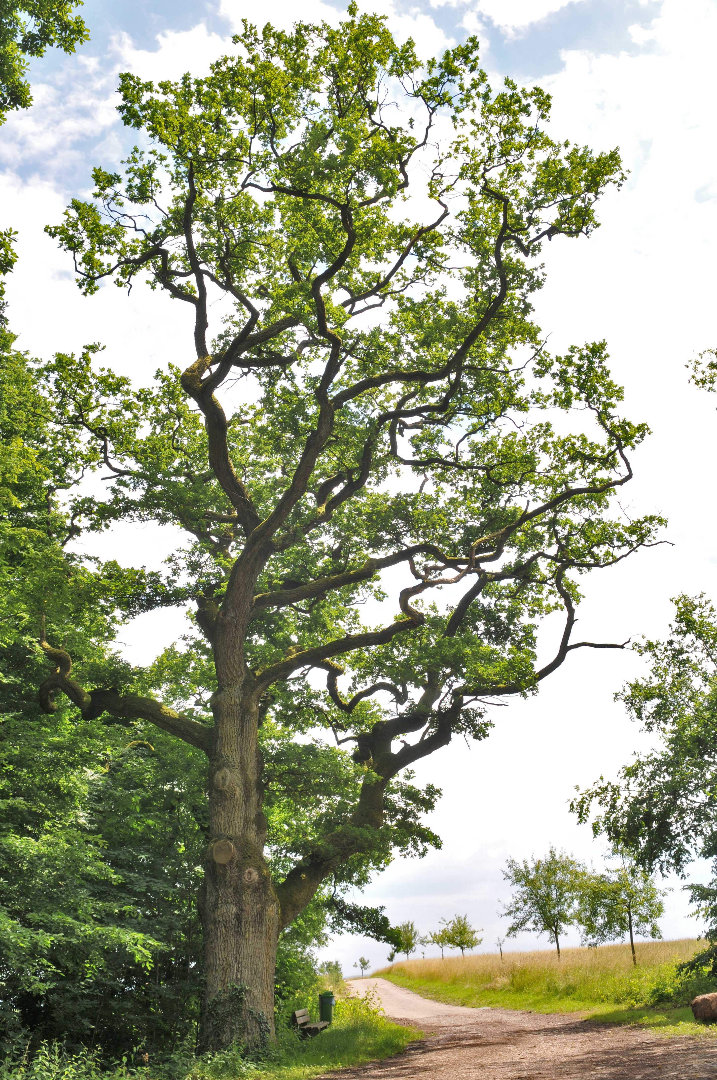 Bemærkelsesværdigt træ i Storhertugdømmet Luxembourg